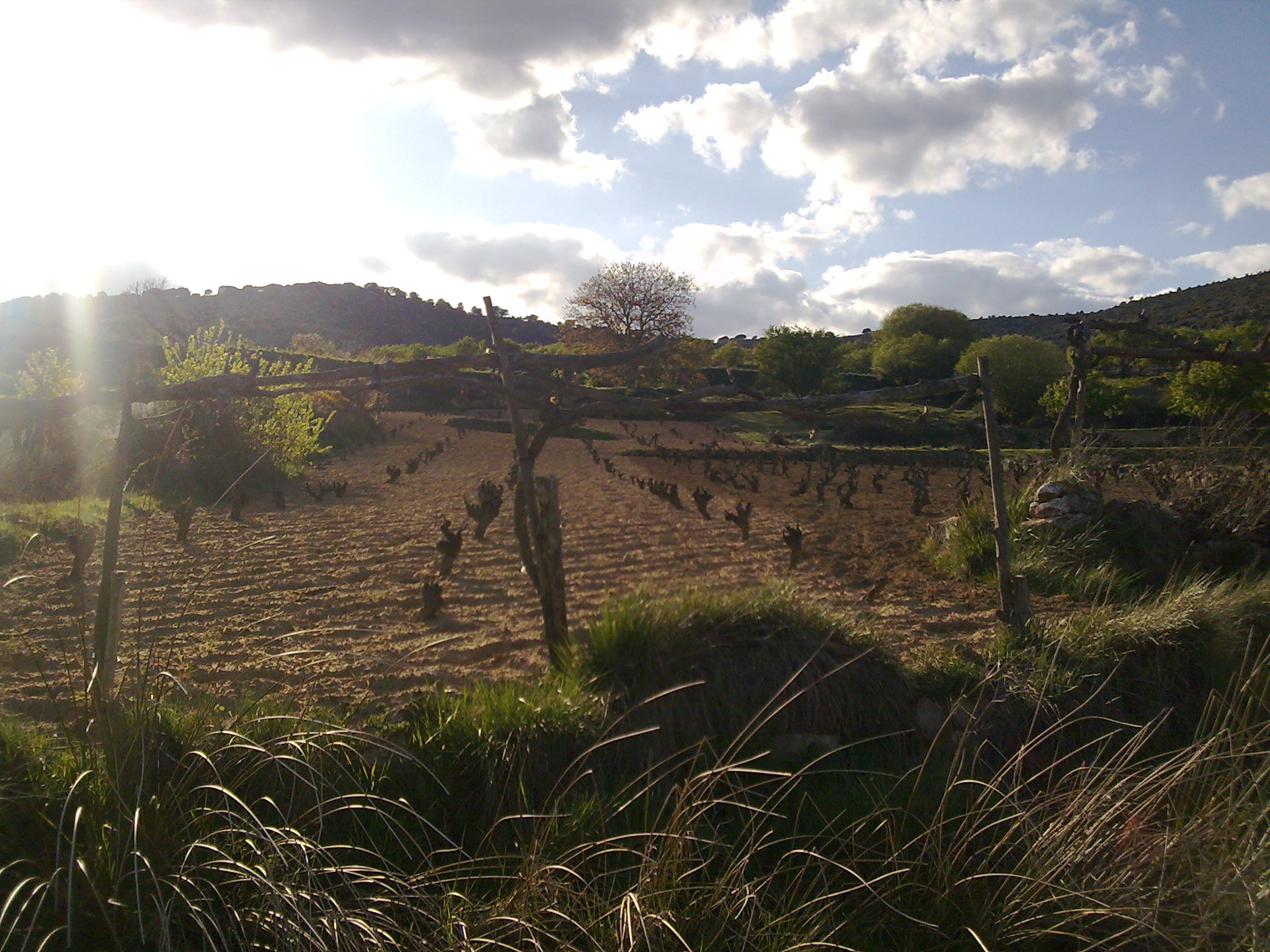 Paisaje de Reillo